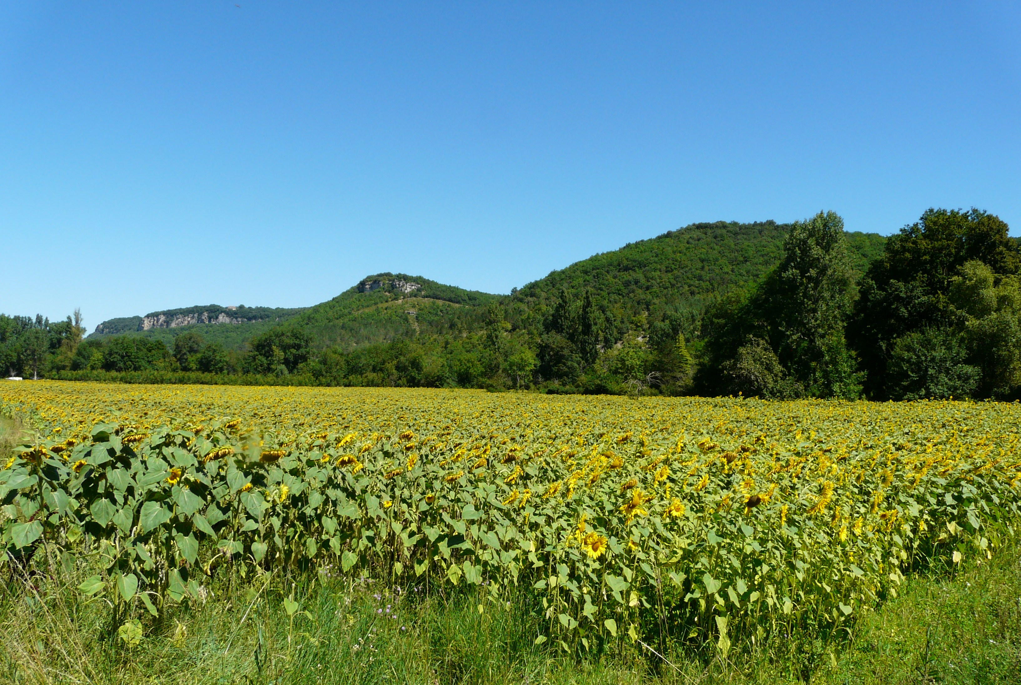 Champ de tournesols et vue sur le pech d'Esparoutis (au fond au centre), Saint-Cybranet, Dordogne, France. Les hauteurs qui encadrent le pech à gauche (falaise du Céou) et à droite, sont sur la commune de Cénac-et-Saint-Julien.